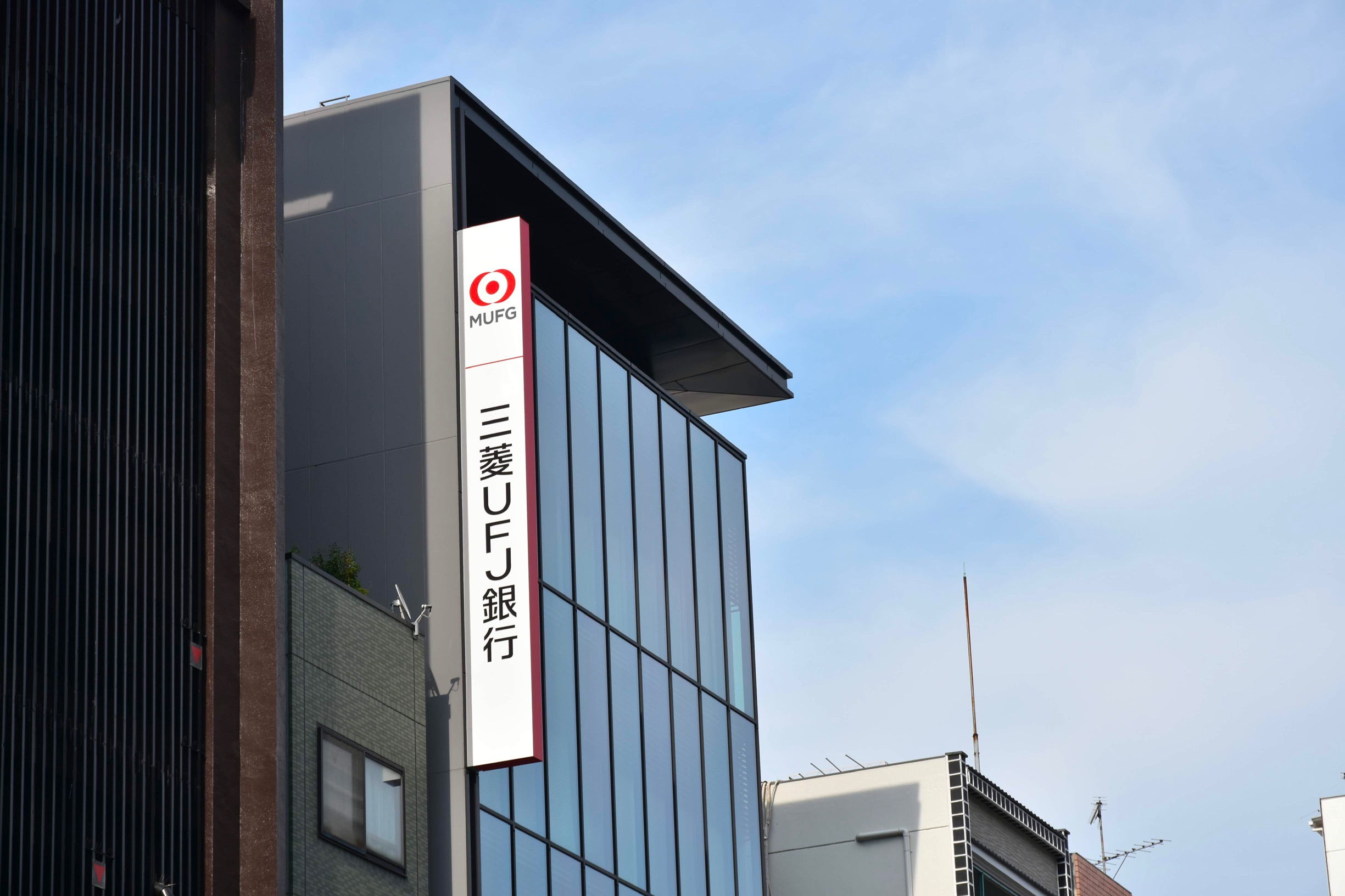 Kantor cabang MUFG di kawasan Asakusa, Tokyo, Jepang.